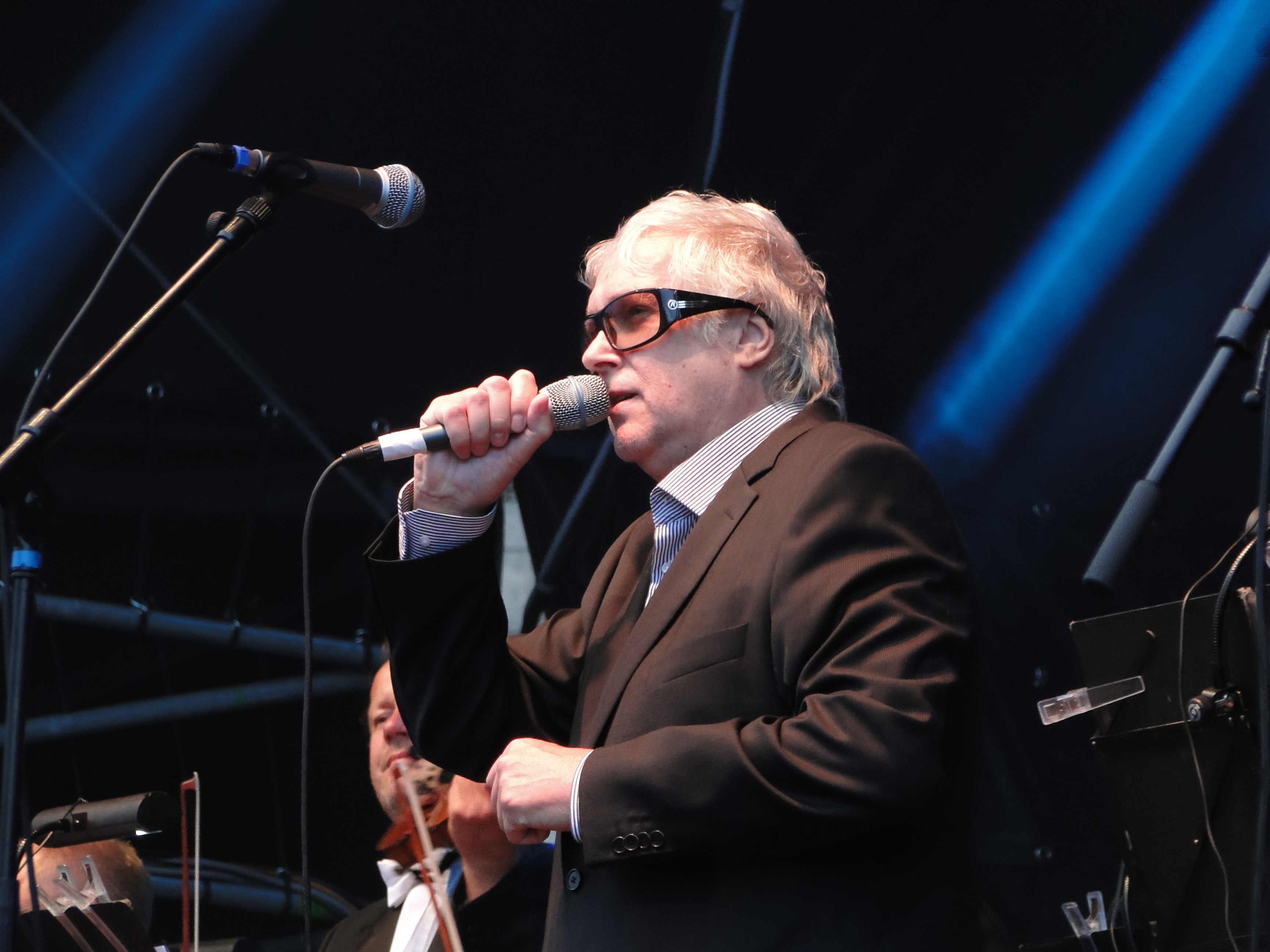 Stephan Trepte, Sänger der Band Electra, während eines Konzert in Dresden im August 2014